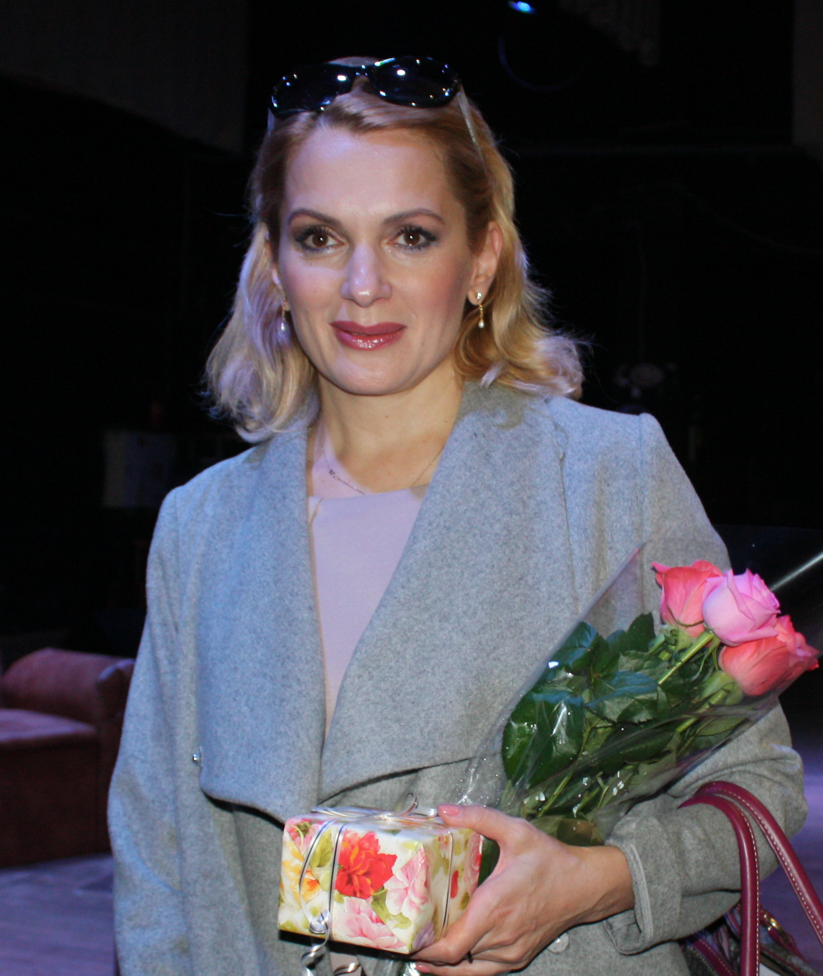 Мария Михайловна Порошина